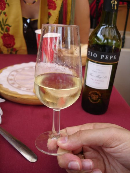 Forma de coger correctamente un catavino